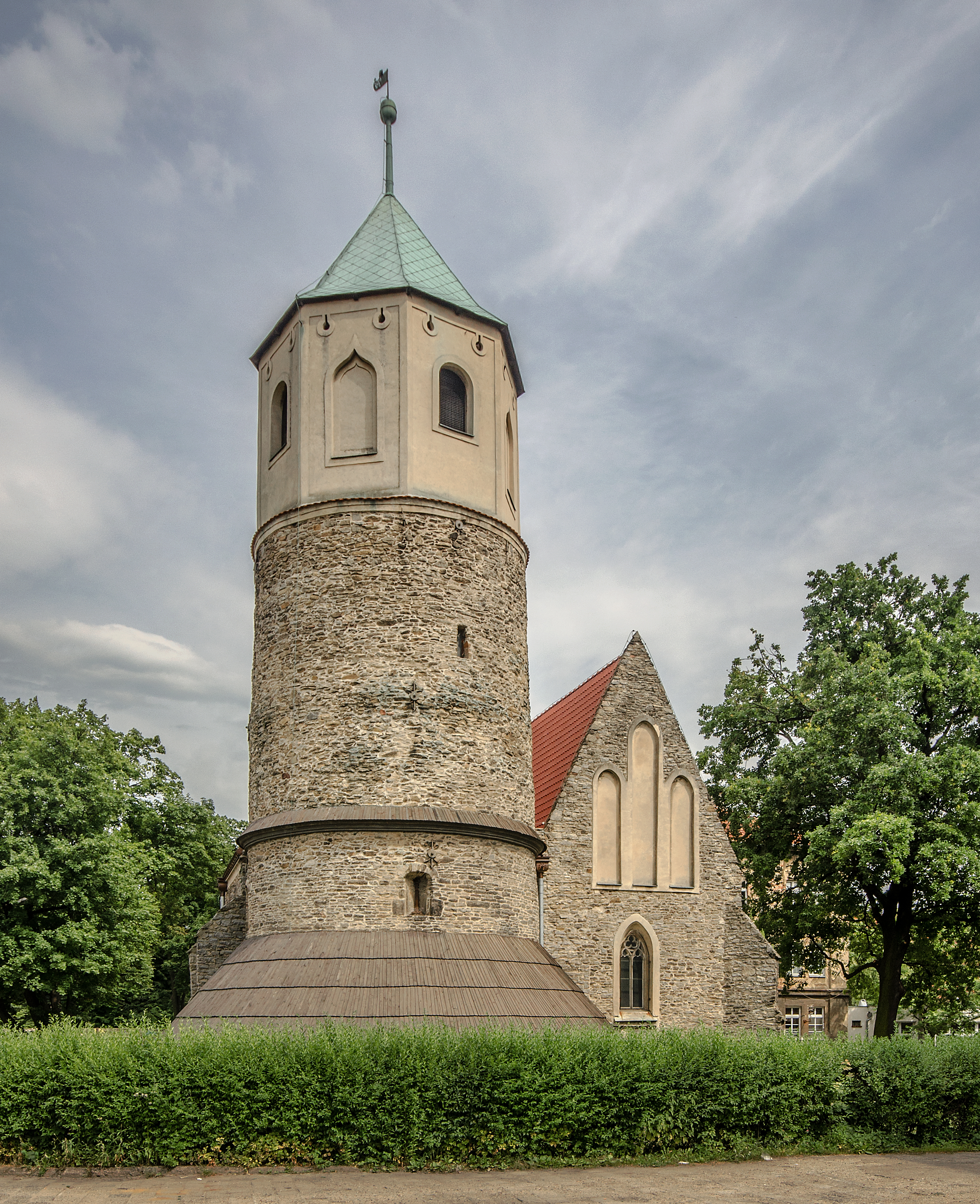 Strzelin, rotunda św. Gotarda, tzw. kościół Polski, kon. XII, XIV, XV